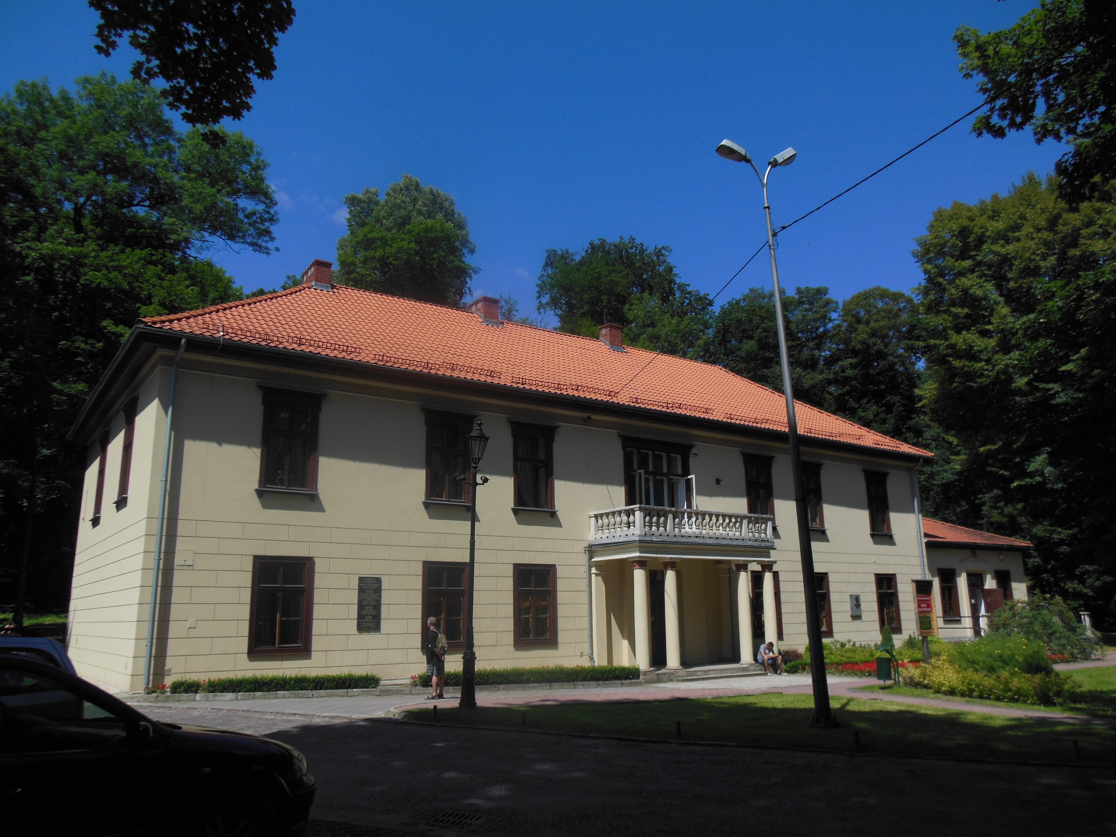 Stary Pałac Potockich w Parku Miejskim w Krzeszowicach.